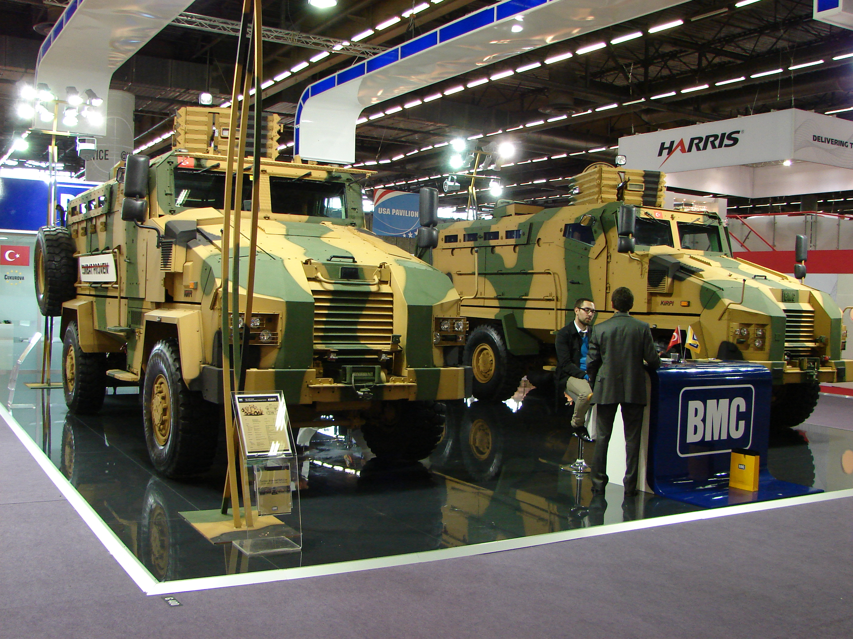 BMC trucks à Eurosatory 2012